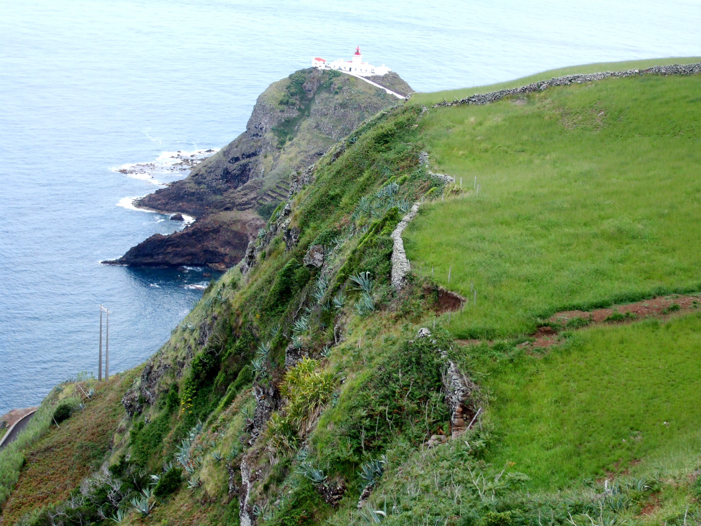 Ponta do Castelo e o Farol de Gonçalo Velho, ilha de Santa Maria, Açores